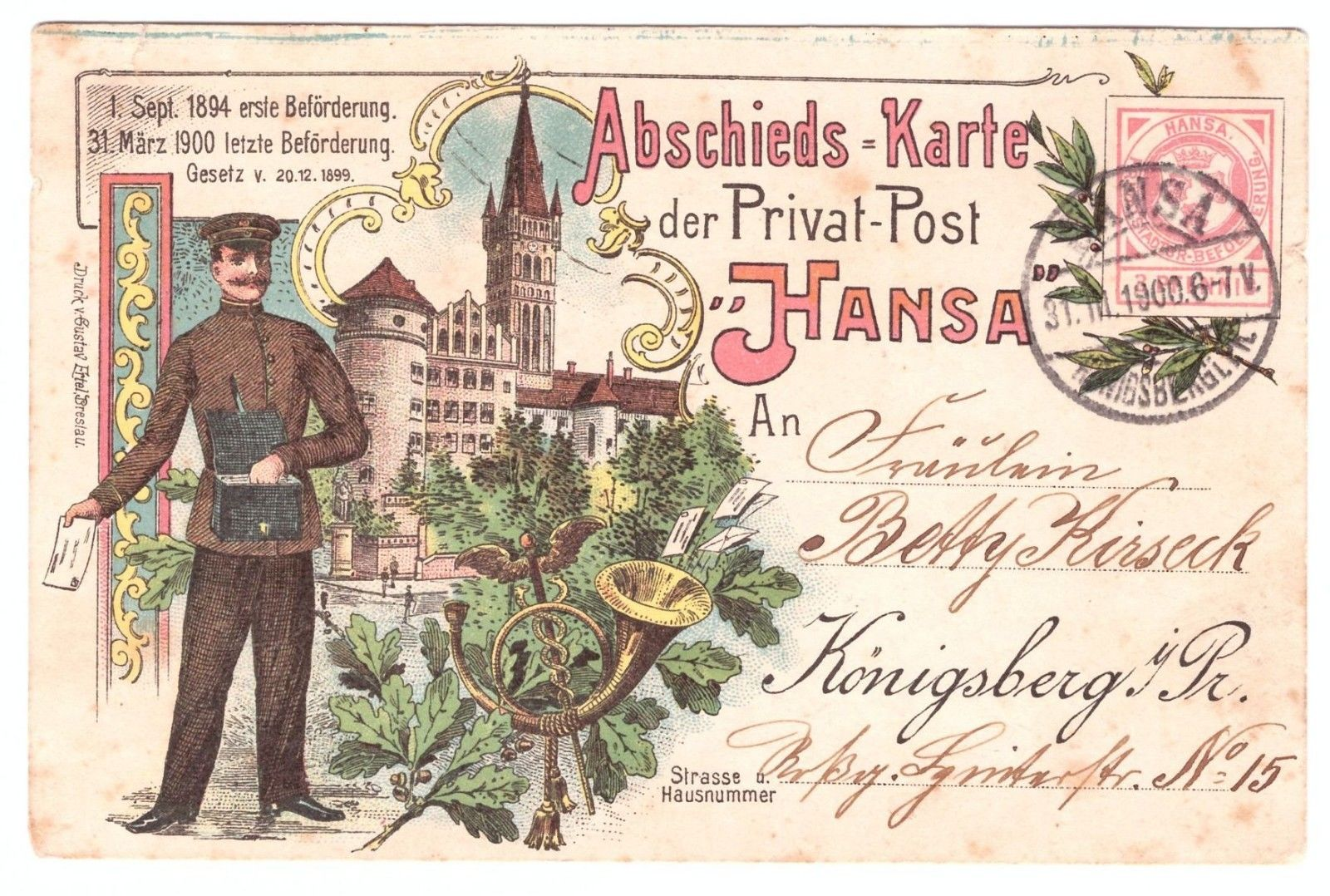 Hansapost Abschiedspostkarte